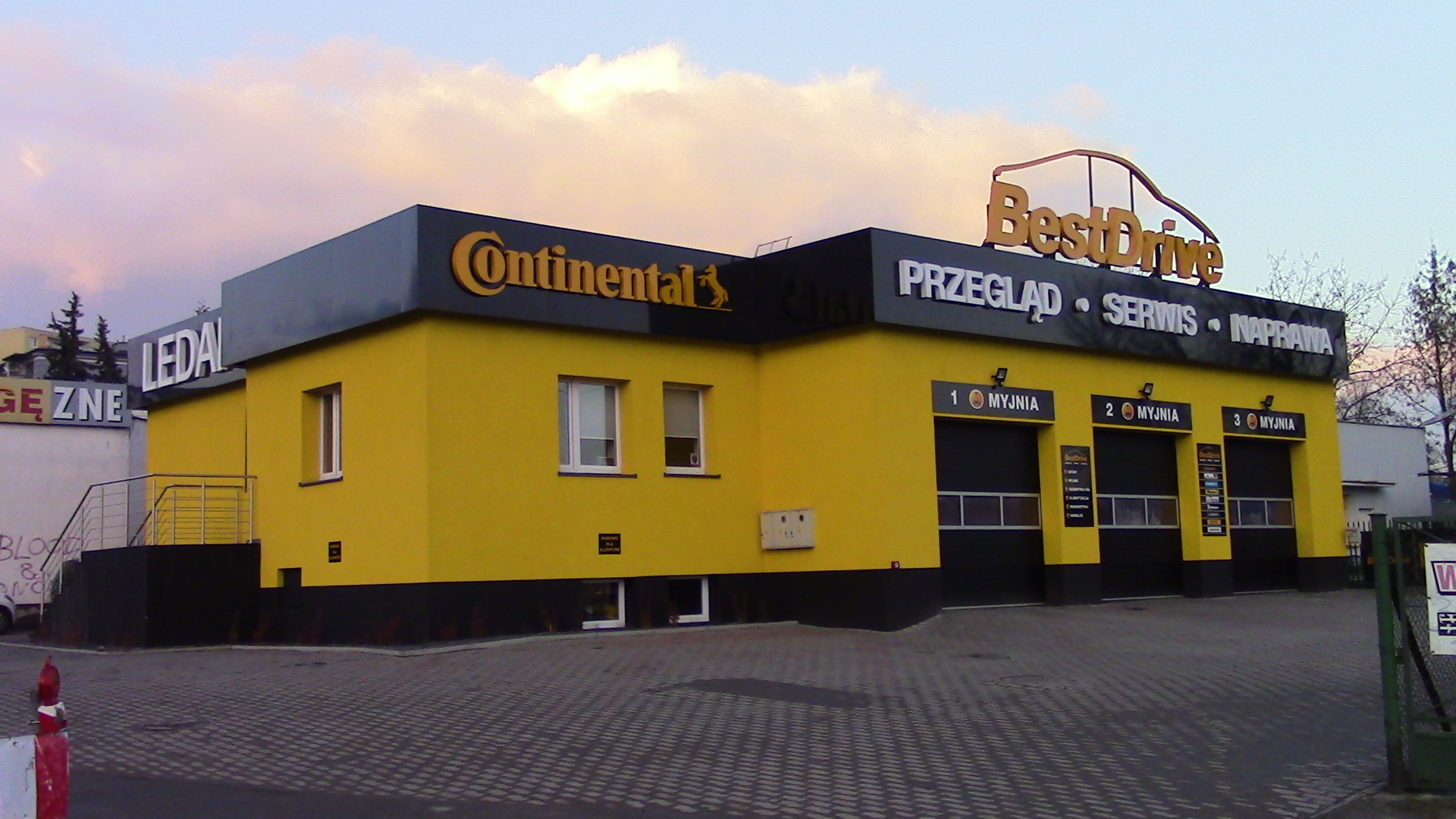 Auto Myjnia